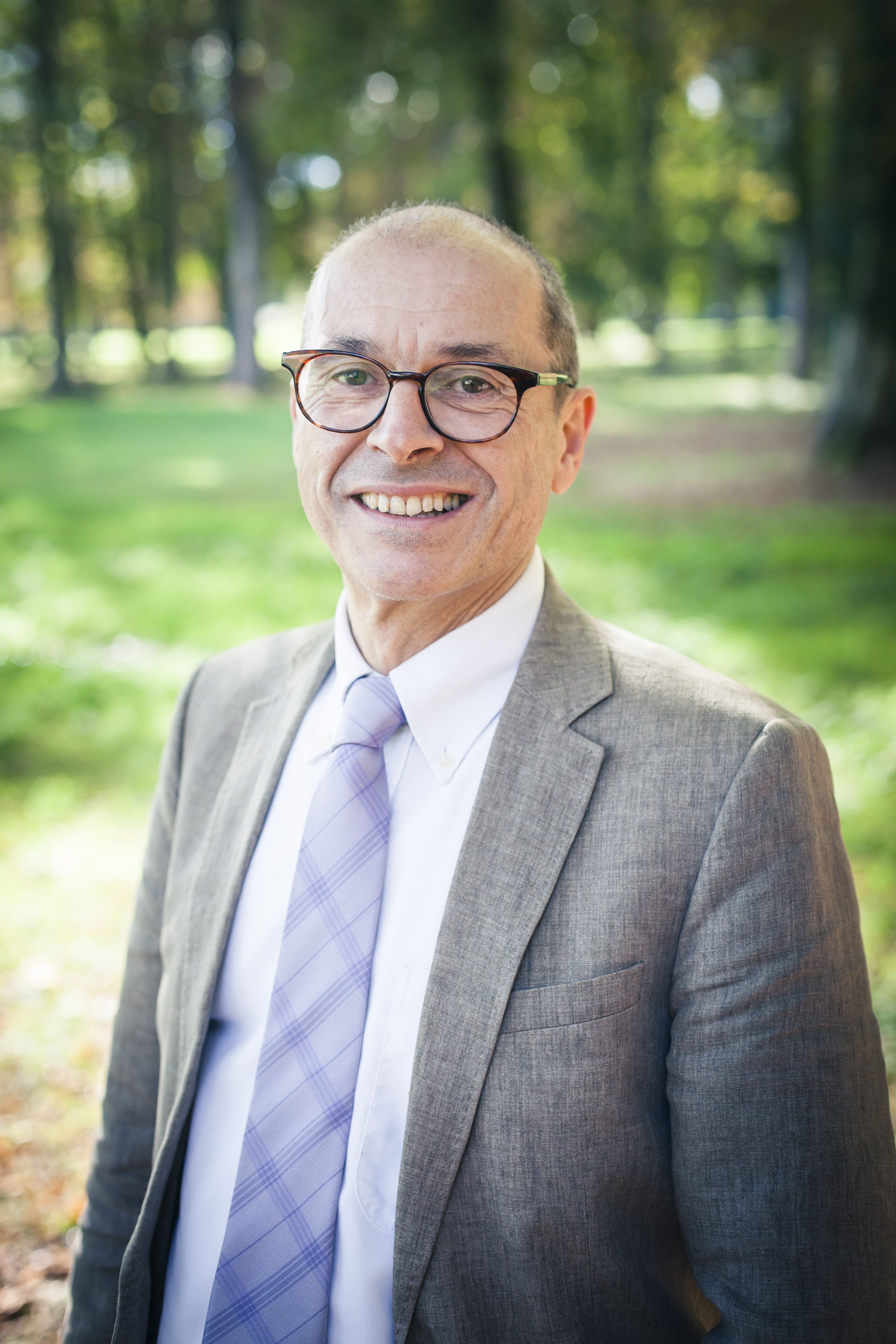 Mario d'Angelo, né le 16 septembre 1954 à Dijon, est un universitaire, spécialisé dans le management dans les entreprises culturelles et les politiques...